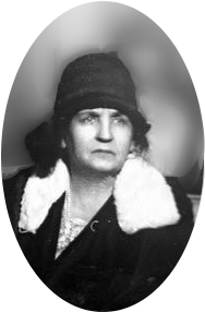 Koncern Ilustrowany Kurier Codzienny - Archiwum Ilustracji